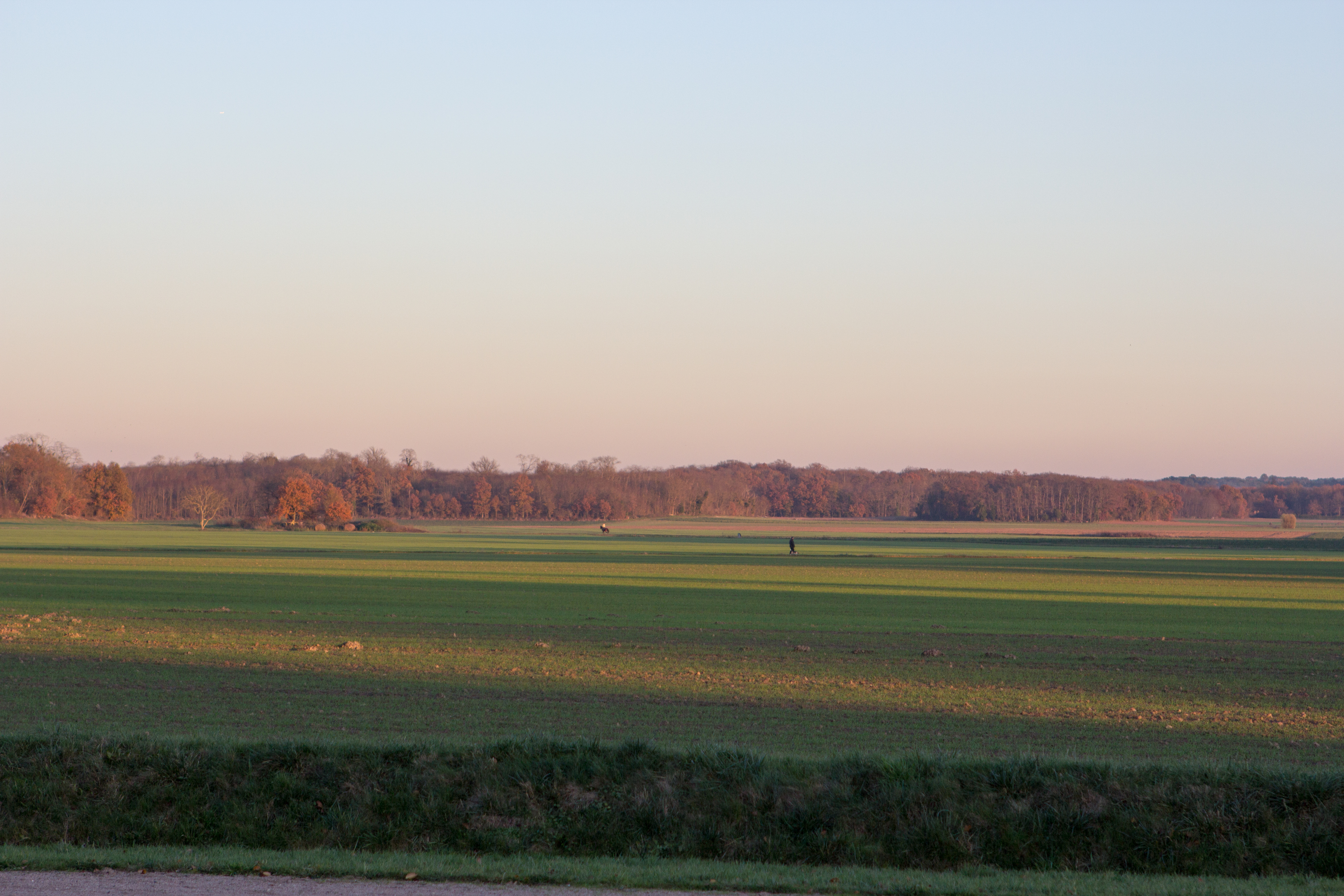 La plaine de la Bière, Fleury-en-Bière, Seine-et-Marne, France.